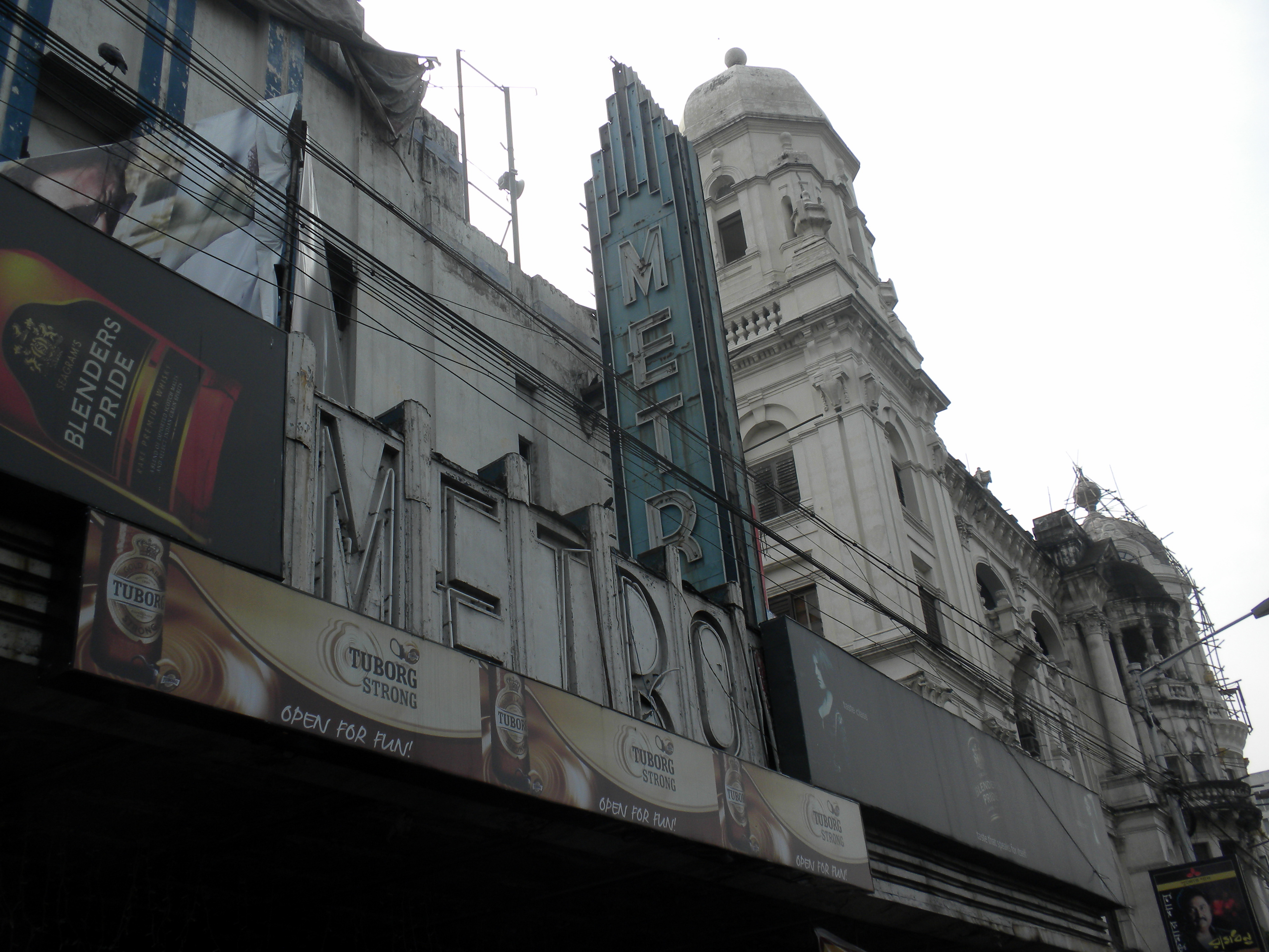 Metro Cinema Kolkata